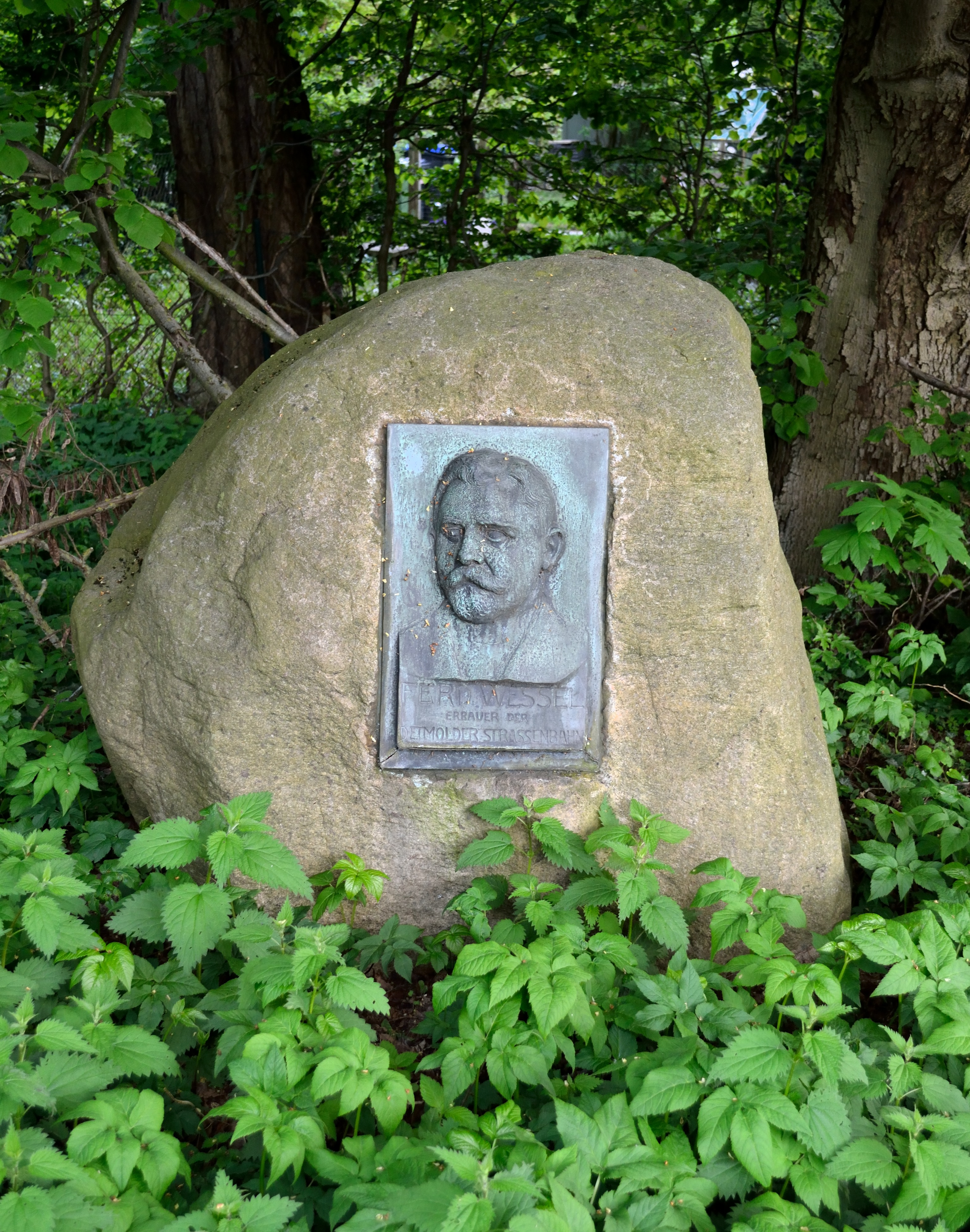 Gedenkstein für Ferdinand Wessel, Erbauer der Detmolder Straßenbahn